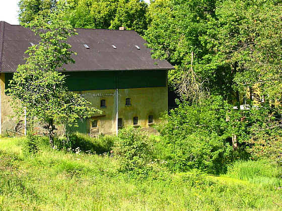 Gut Listringhausen in Meinerzhagen, Südwest-Ansicht des Westflügels